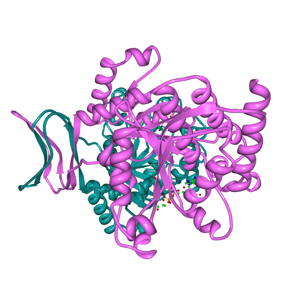 Imagen 3D de la IDH1 - Isocitrato deshidrogenasa (NADP+) citoplasmática obtenida con ProteinWorkshop.